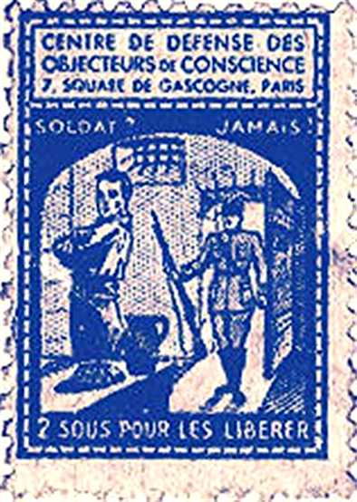 Timbre en faveur des objecteurs de conscience sans doute édité par la "Ligue des objecteurs" (France) en 1933.